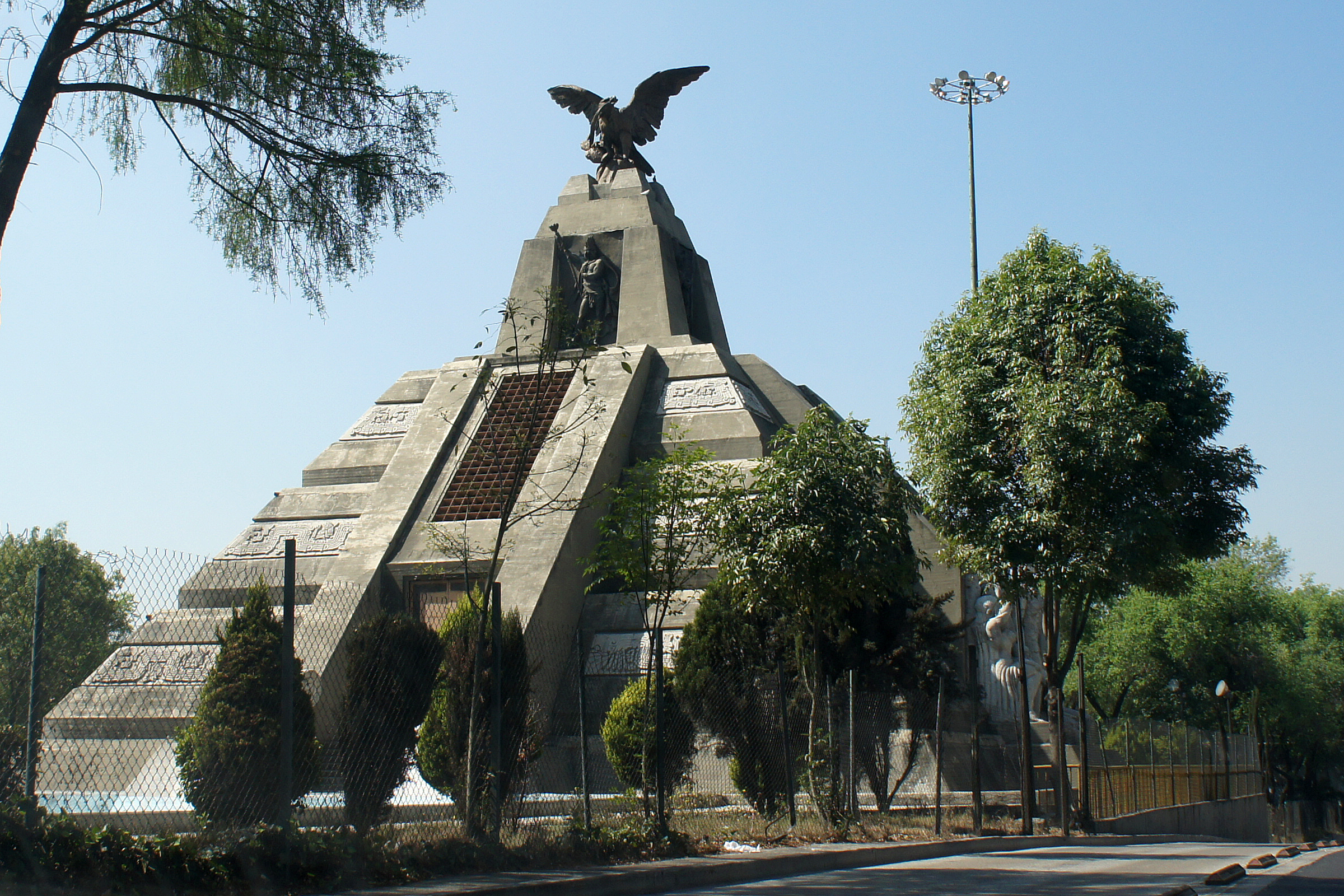 Monumento a La Raza, México DF